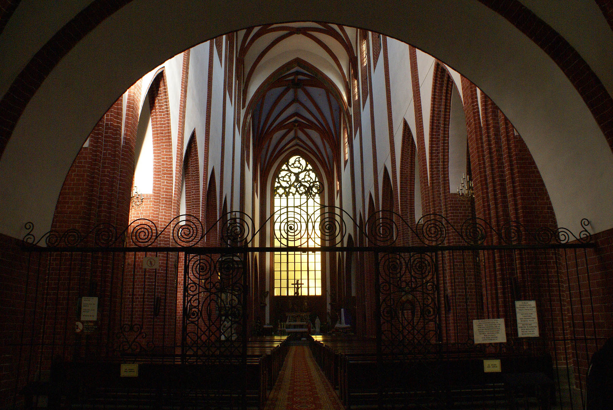 Wrocław, kościół p.w. św. Marii Magdaleny, ob. katedra polsko-kat., 1342-1360, 1 poł. XV, 1888-1992, po 1945